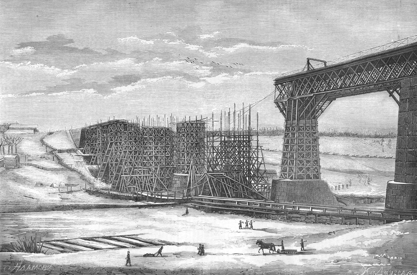 Состояние работ на Мстинском Мосту. Утро 31 декабря 1869.